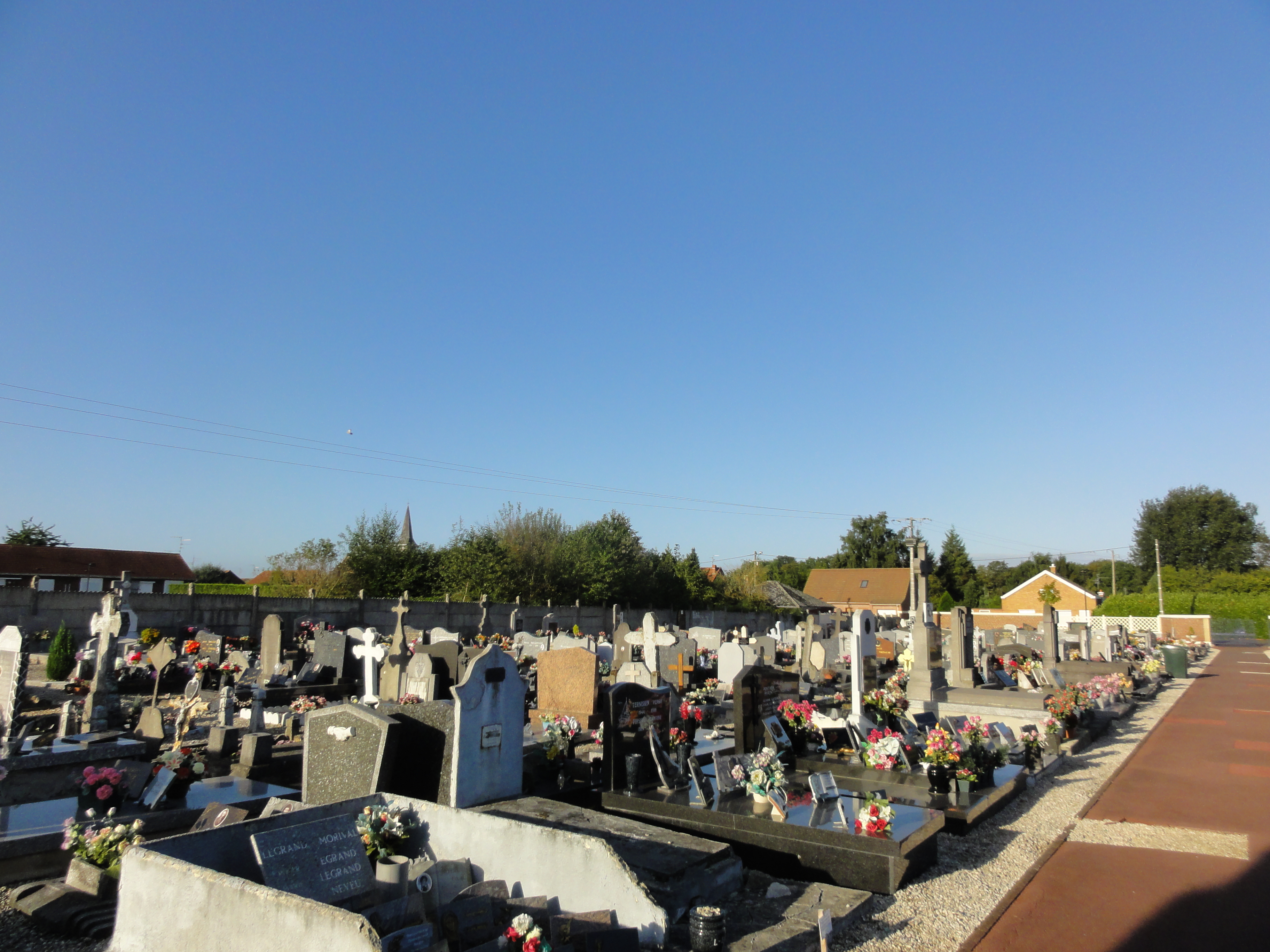 Cimetière des cités de la fosse Arenberg de la Compagnie des mines d'Anzin dans le bassin minier du Nord-Pas-de-Calais, Raismes (près du finage de Wallers), Nord, Nord-Pas-de-Calais, France.